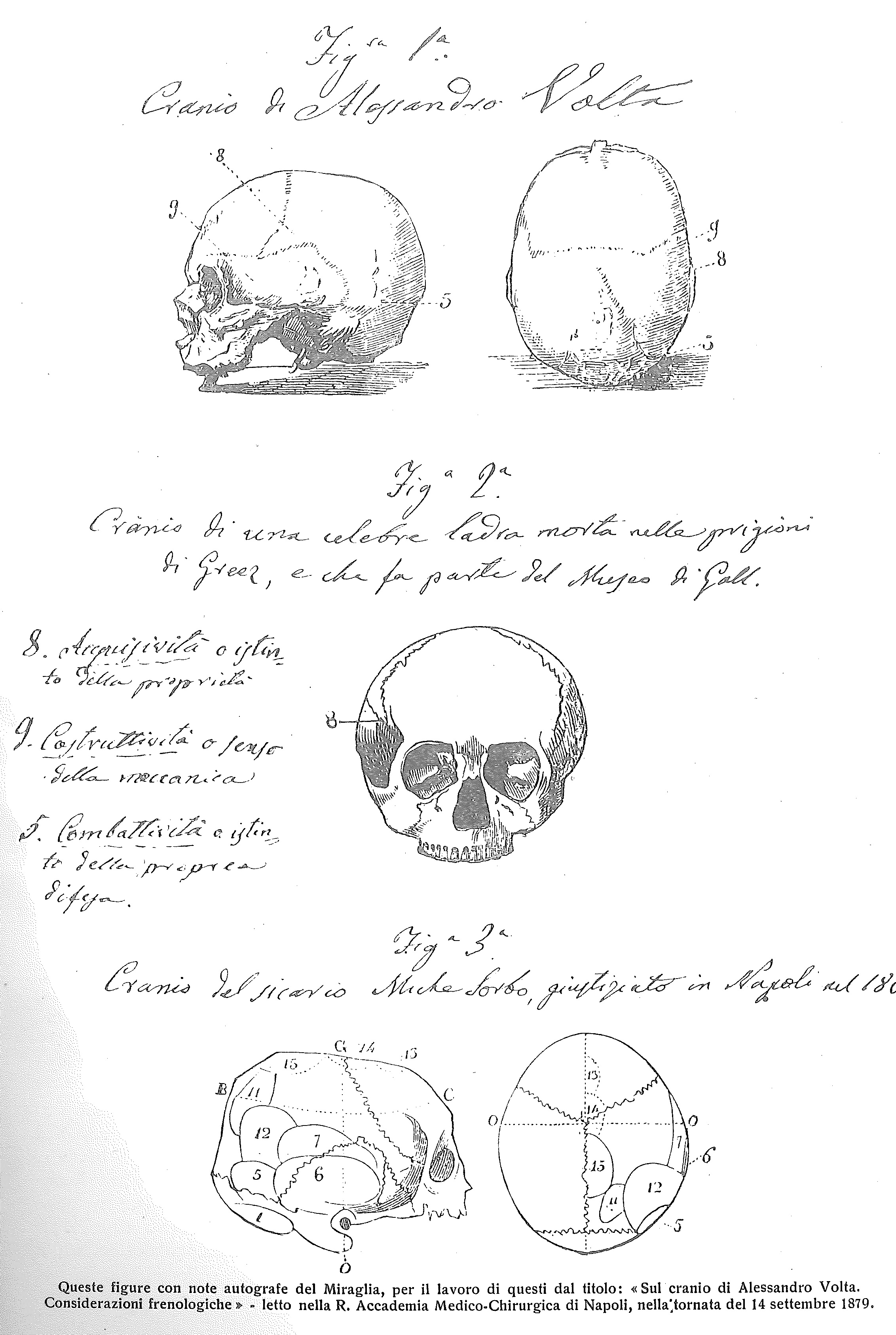 Figure con note autografe del celebre frenologo italiano Biagio Gioacchino Miraglia e relative considerazioni frenologiche